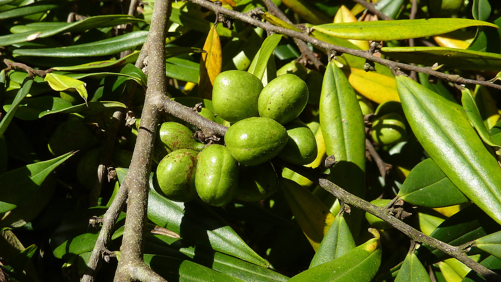 Xylopia frutescens Aubl.